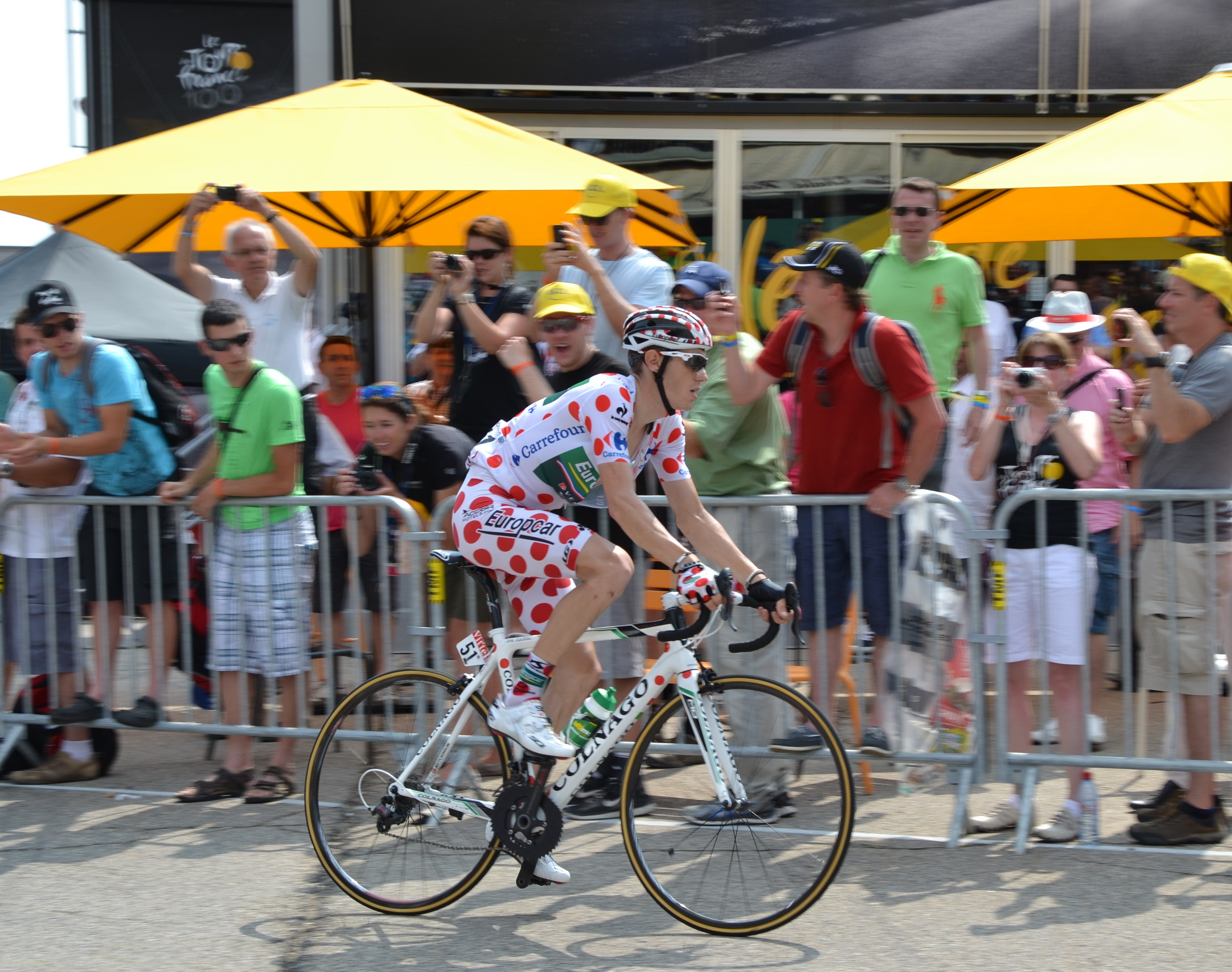 Au Chalet Reynard, lors de la 15ème étape du Tour de France 2013